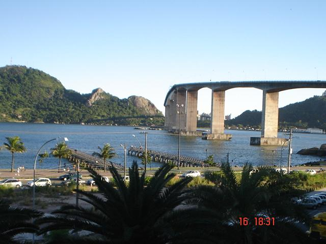 Terceira Ponte, em Vitória, capital do Espírito Santo, Brasil.